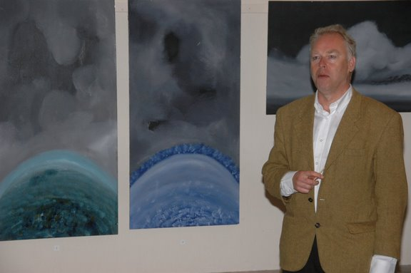 Wim Braakman, dutch painter